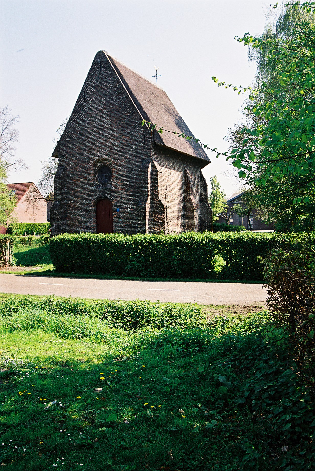 De kapel behorende bij het verdwenen kasteel Gageldonk te Breda.